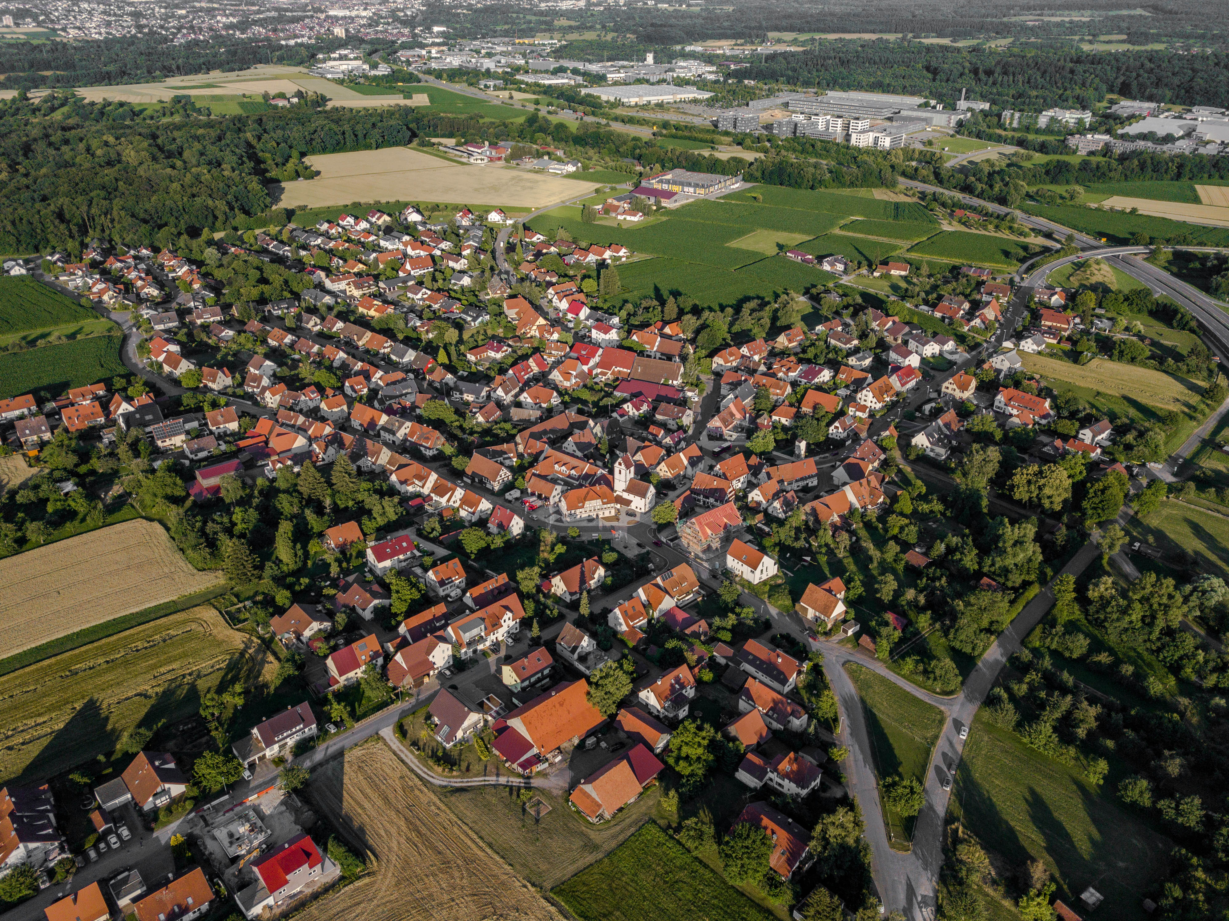 Luftbild von Jettenburg